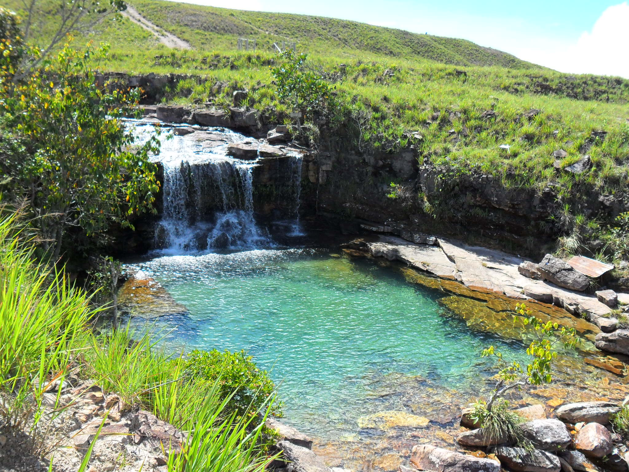 Encantadora Laguna en la cima del Arapan Merú. Gran Sabana